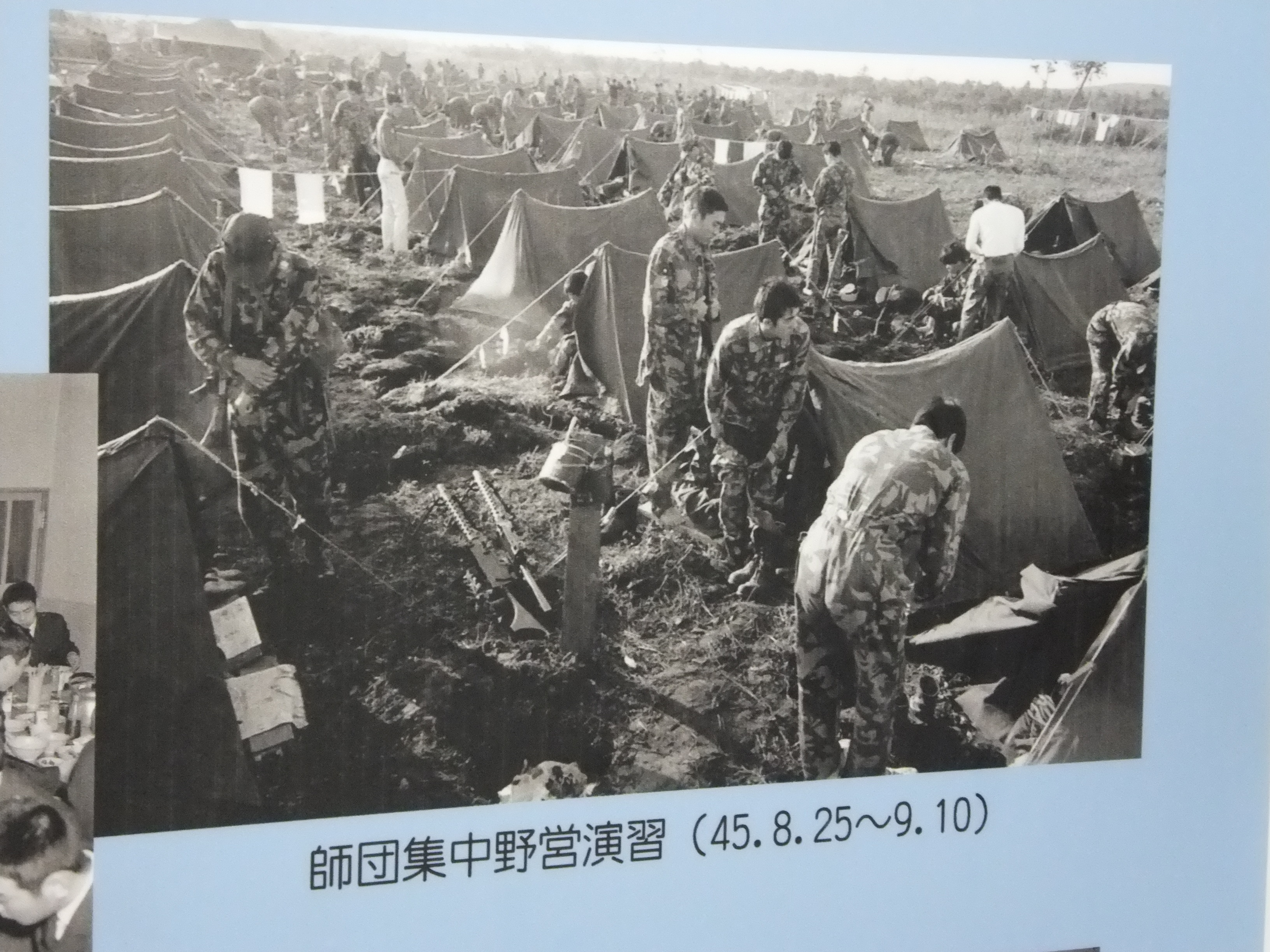 二人用天幕で宿営する部隊の様子を撮影した写真を含むパネル